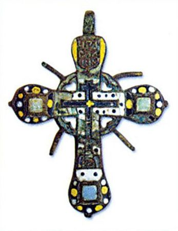 Крыж. Медзь, эмаль. ХVІ ст. Знойдзены ў могільніку Снядзін Петрыкаўскага раёна (Гомельшчына). Раскопкі Алега Іова